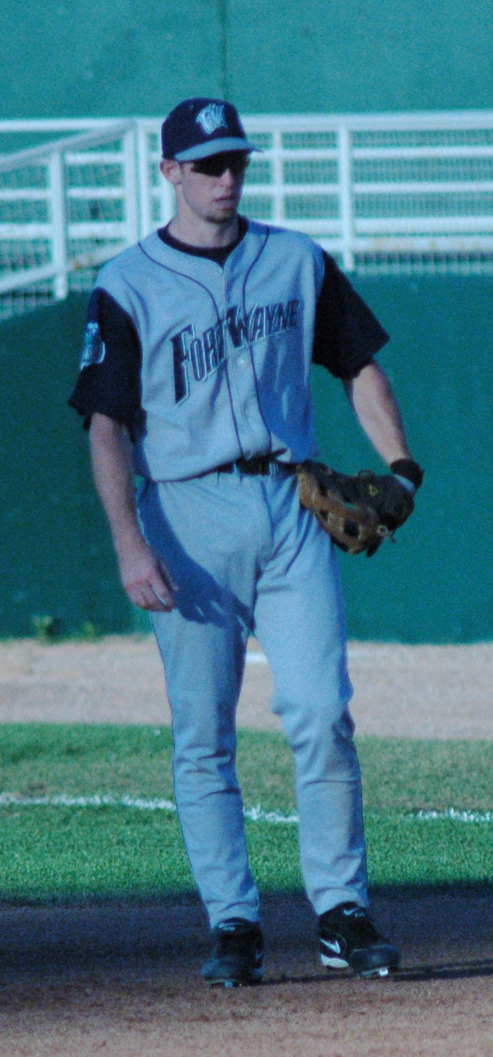 Mike Baxter